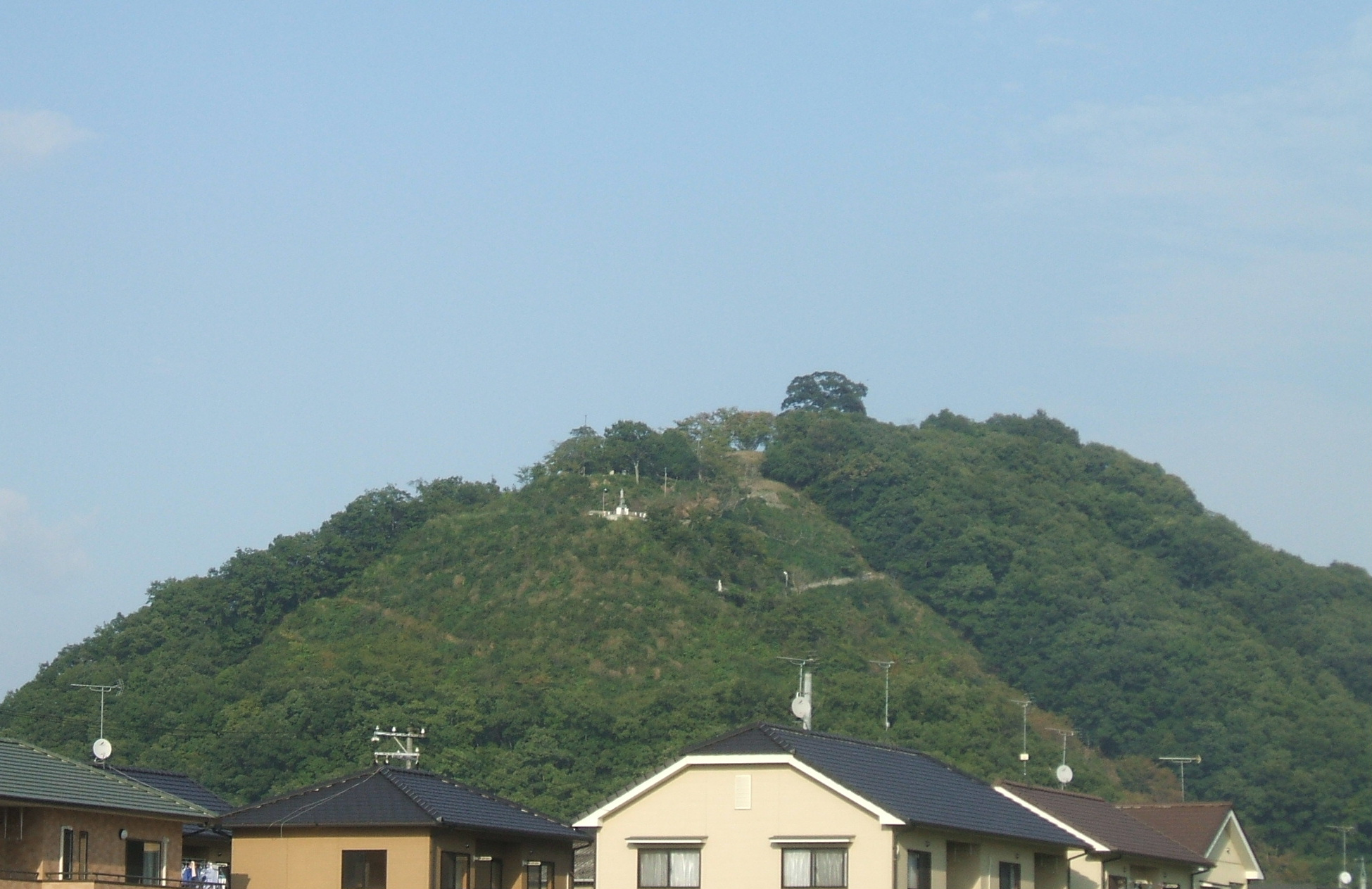 広島県福山市神辺町にある神辺城を撮影